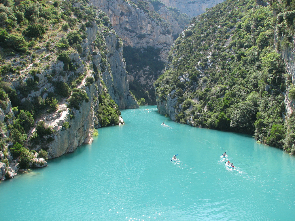 Gorges du Verdon France